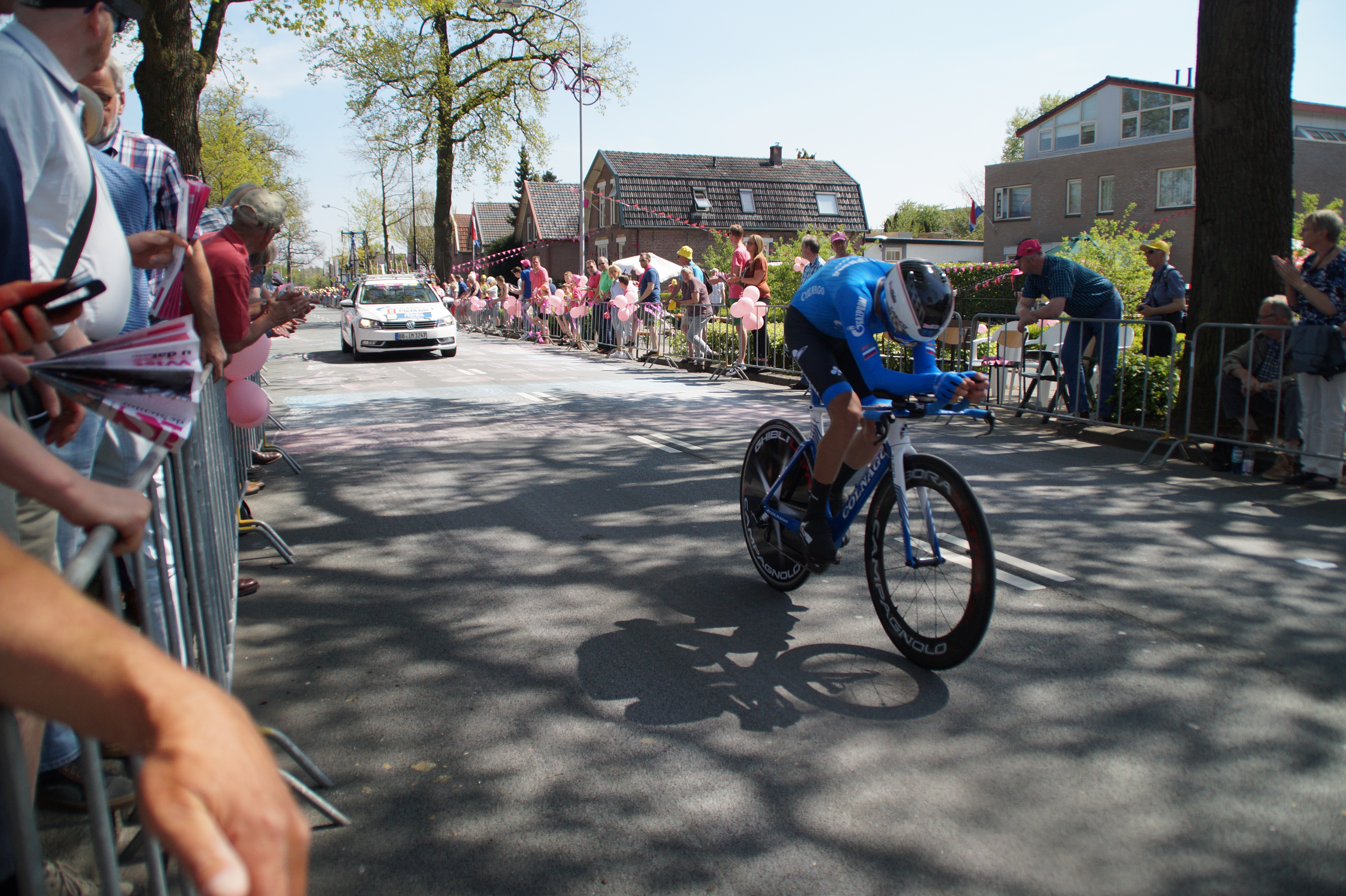 Alexei Rybalkin